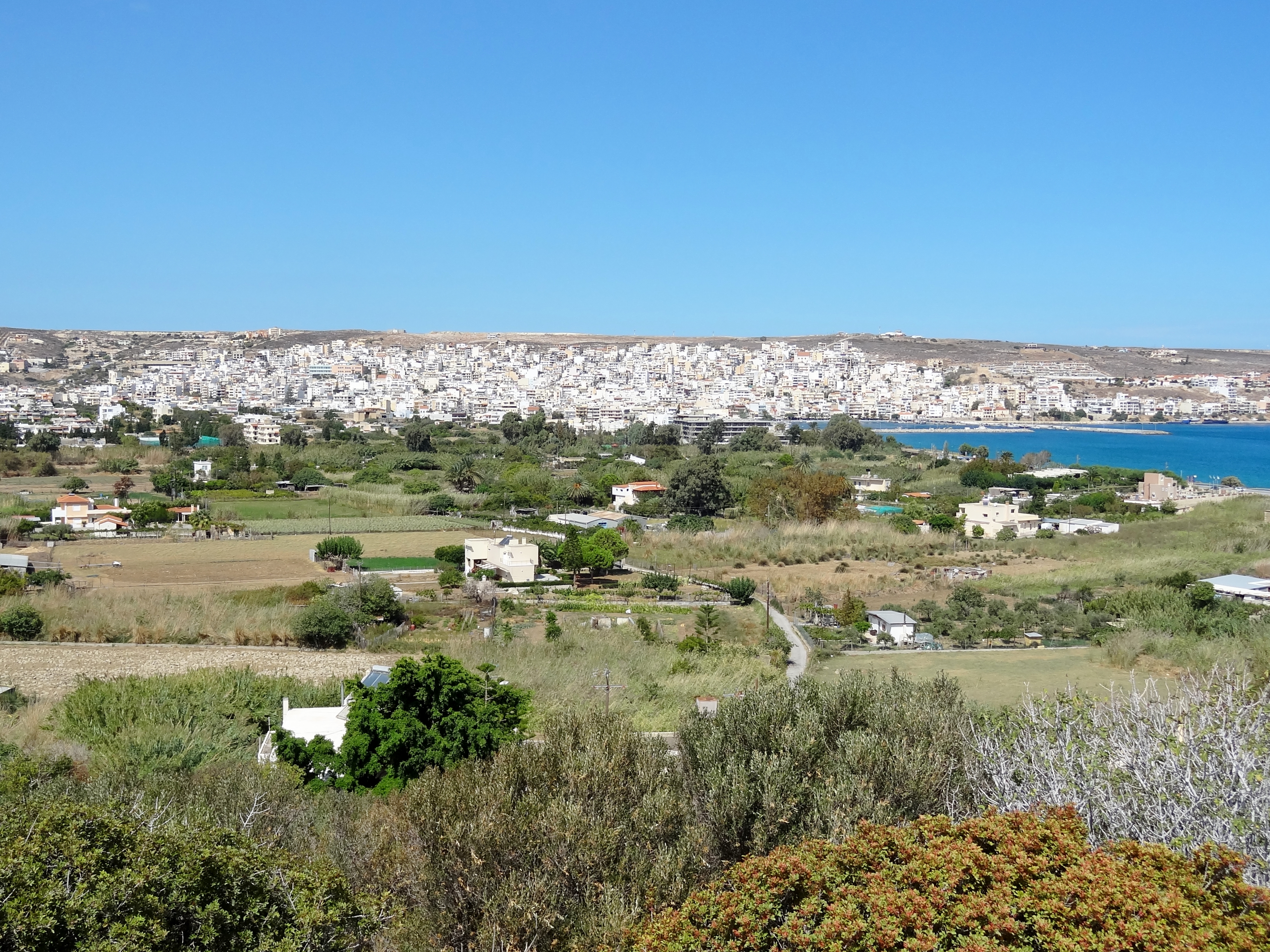 Sitia (Σητεία) von Südosten, Kreta, Griechenland